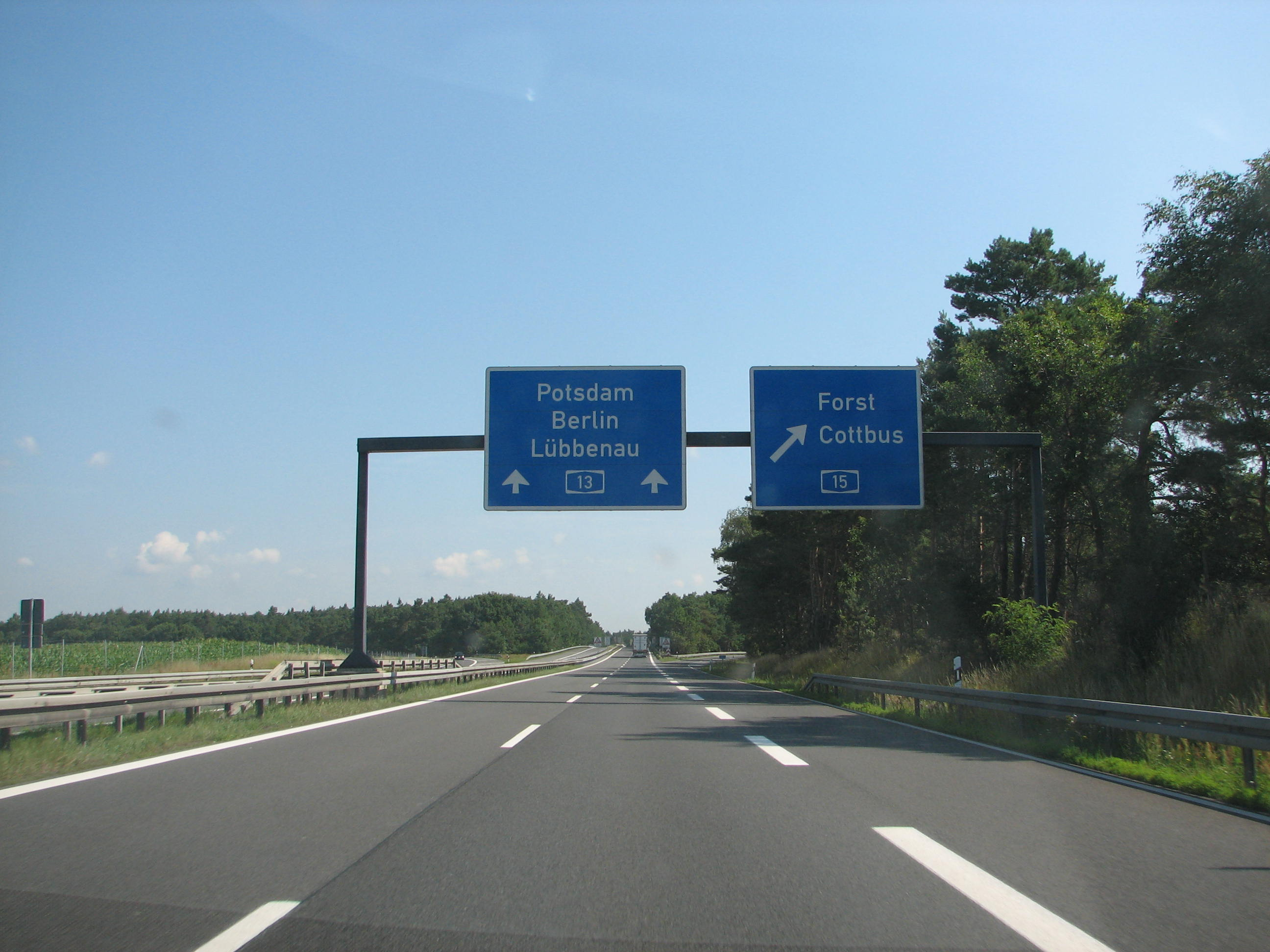 Hinweisschild am Autobahndreieck Spreewald